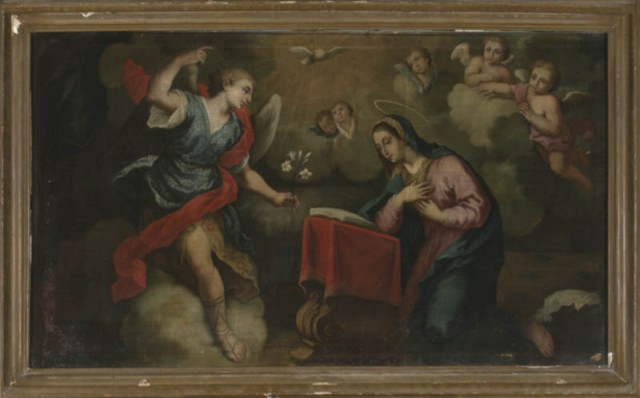 Anunciació- Bernat Amorós- Museu Comarcal de Cervera